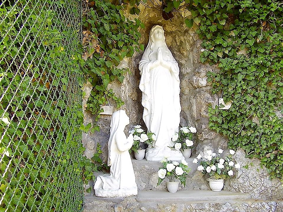 Dédestapolcsányban a Serényi István-emlékkeresztet fölött található a sziklába vájt Lourdes-i Mária-barlang.